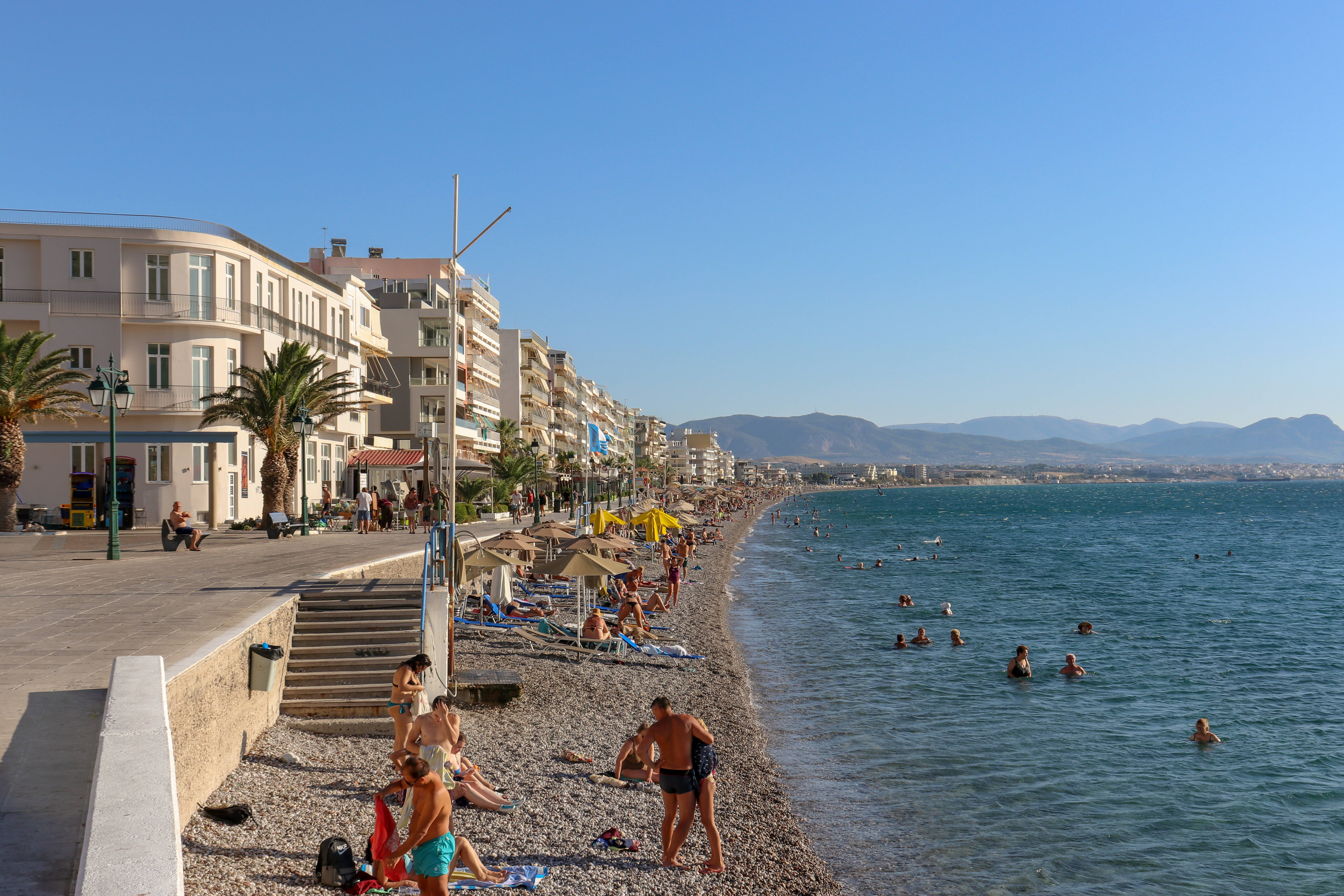 Пляж в городе Лутраки, Греция